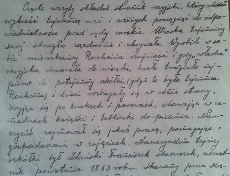 Zapis w szkolnej kronice spisanej w 1938 r. traktujący o początkach szkolnictwa w Rachcinie (tajna szkółka pod zaborem rosyjskim).